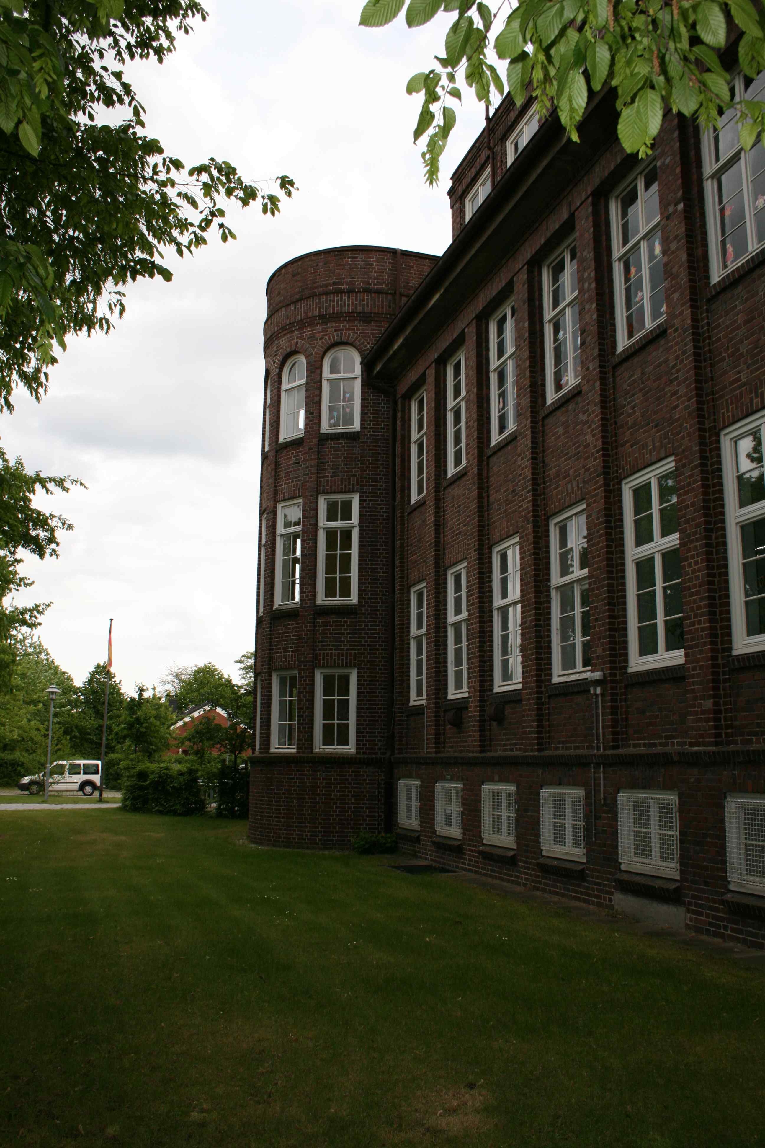 Die Volksschule Fiddigshagen im Ortsteil Nettelnburg von Bergedorf wurde 1927/28 nach Plänen von Baurat Völker errichtet. Sie erinnert in ihrer Gestalt an viele Hamburger Schulbauten von Fritz Schumacher. This is a photograph of an architectural monument.